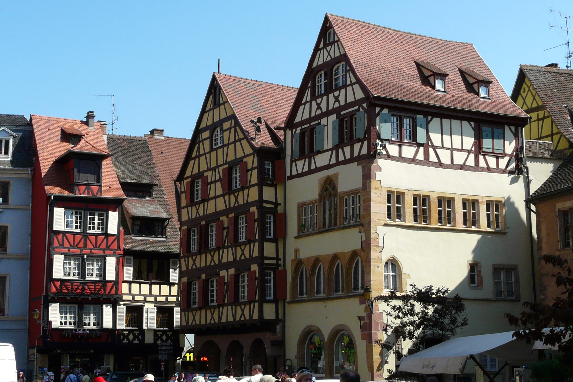 Place de la cathédrale, Colmar. A droite, Maison Adolphe, inscrite aux Monuments Historiques.